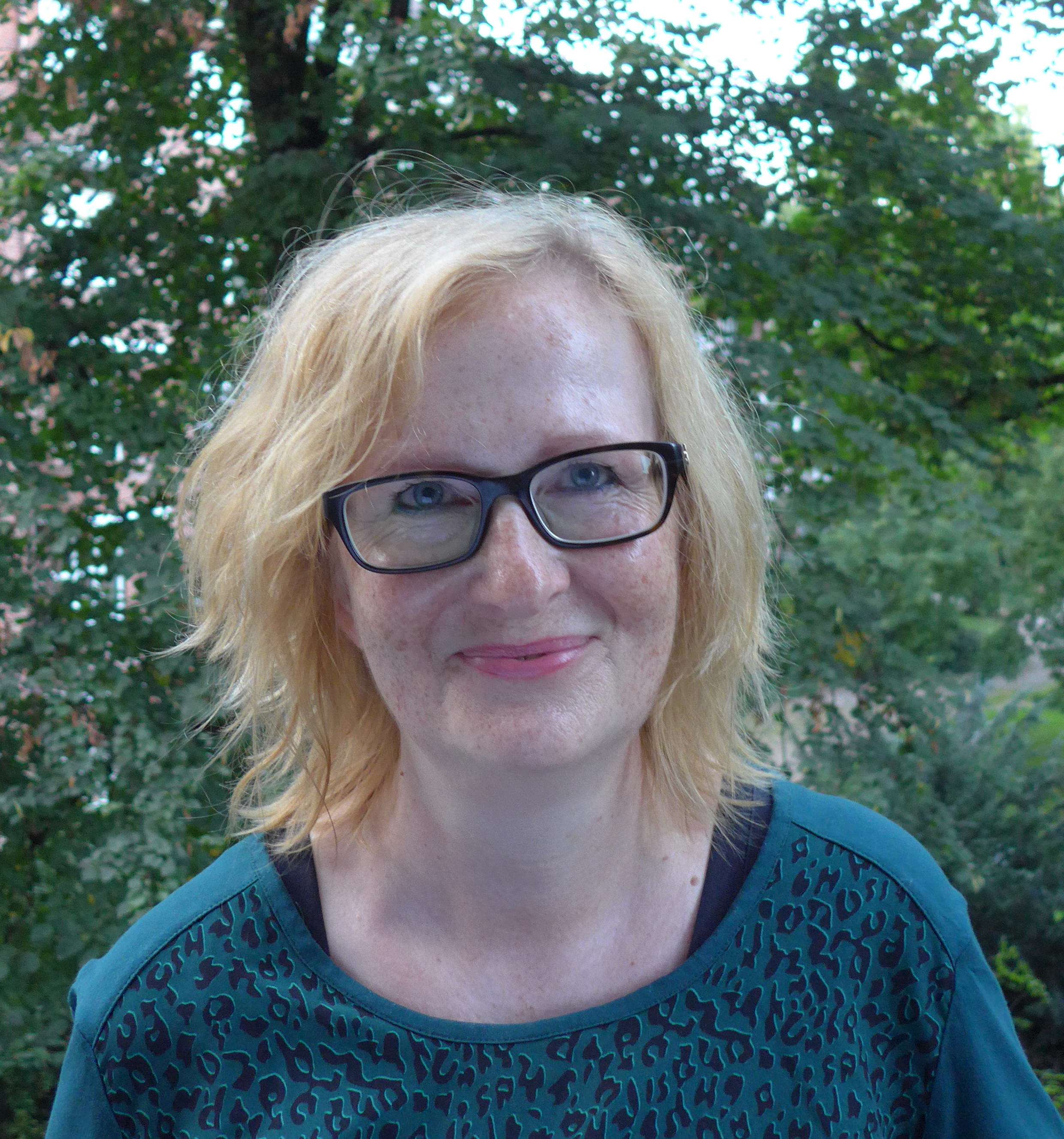 Portrait der deutschen Autorin Renate Simonsen